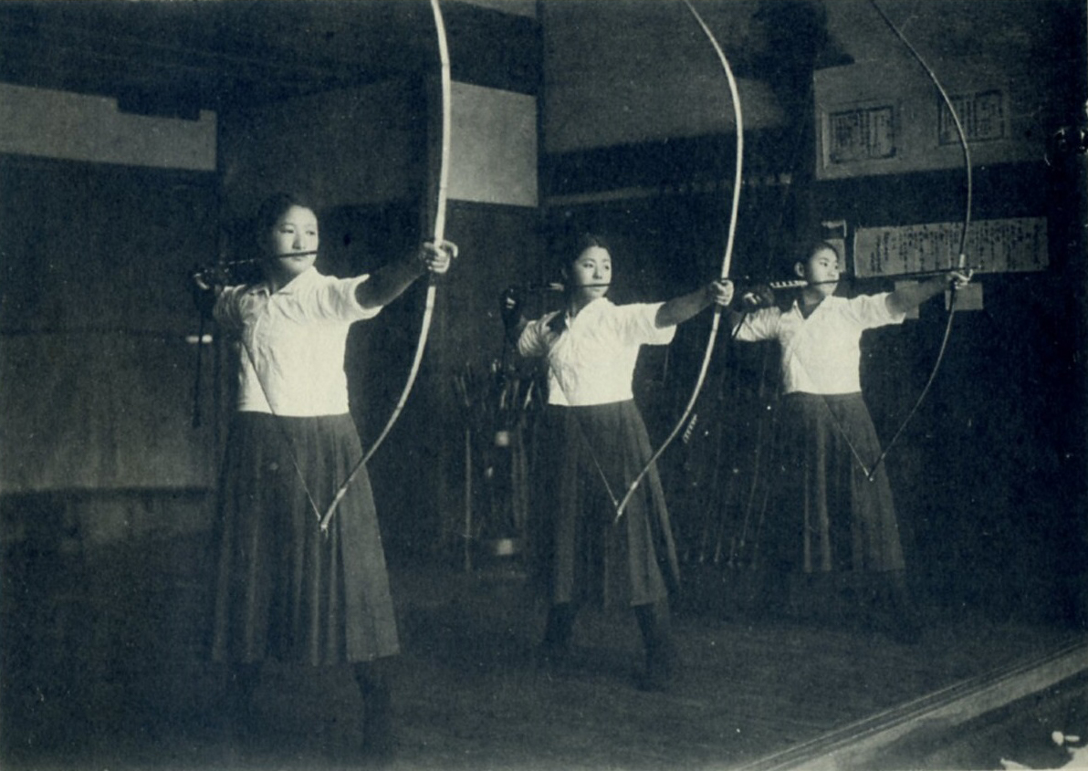 市立富山高等女学校弓道場